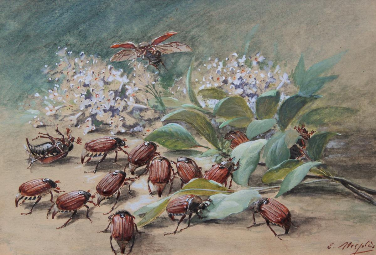 Hannetons Et Lilas Blanc